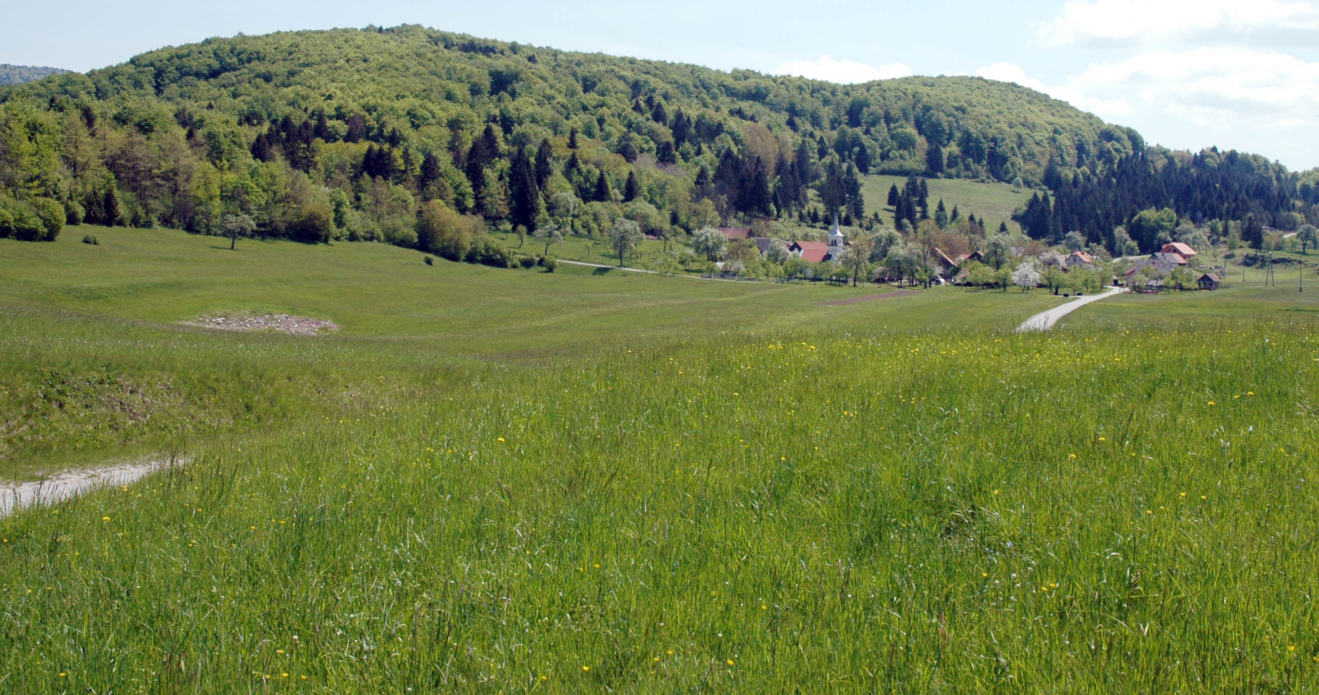 Babna Polica, village in Slovenia